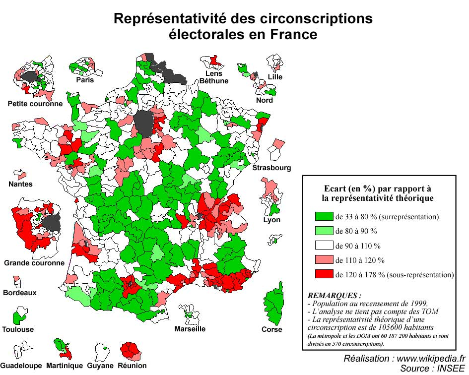 Carte des circonscriptions législatives françaises (hors TOM) avec l'ampleur de la sous-représentation ou surreprésentation (écart en % par rapport à la population théorique)